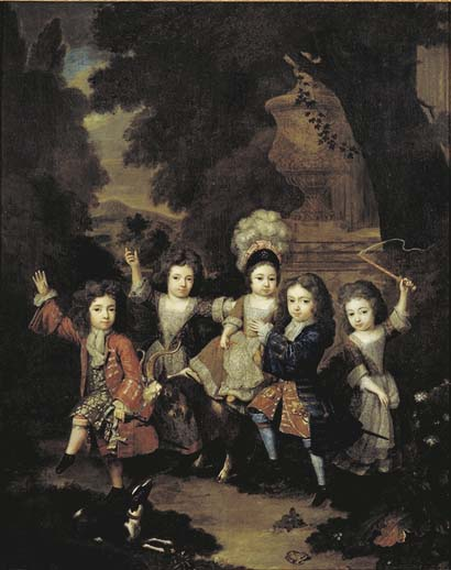 Manuel Lopes Suasso (1698-1773) met broers en zusters